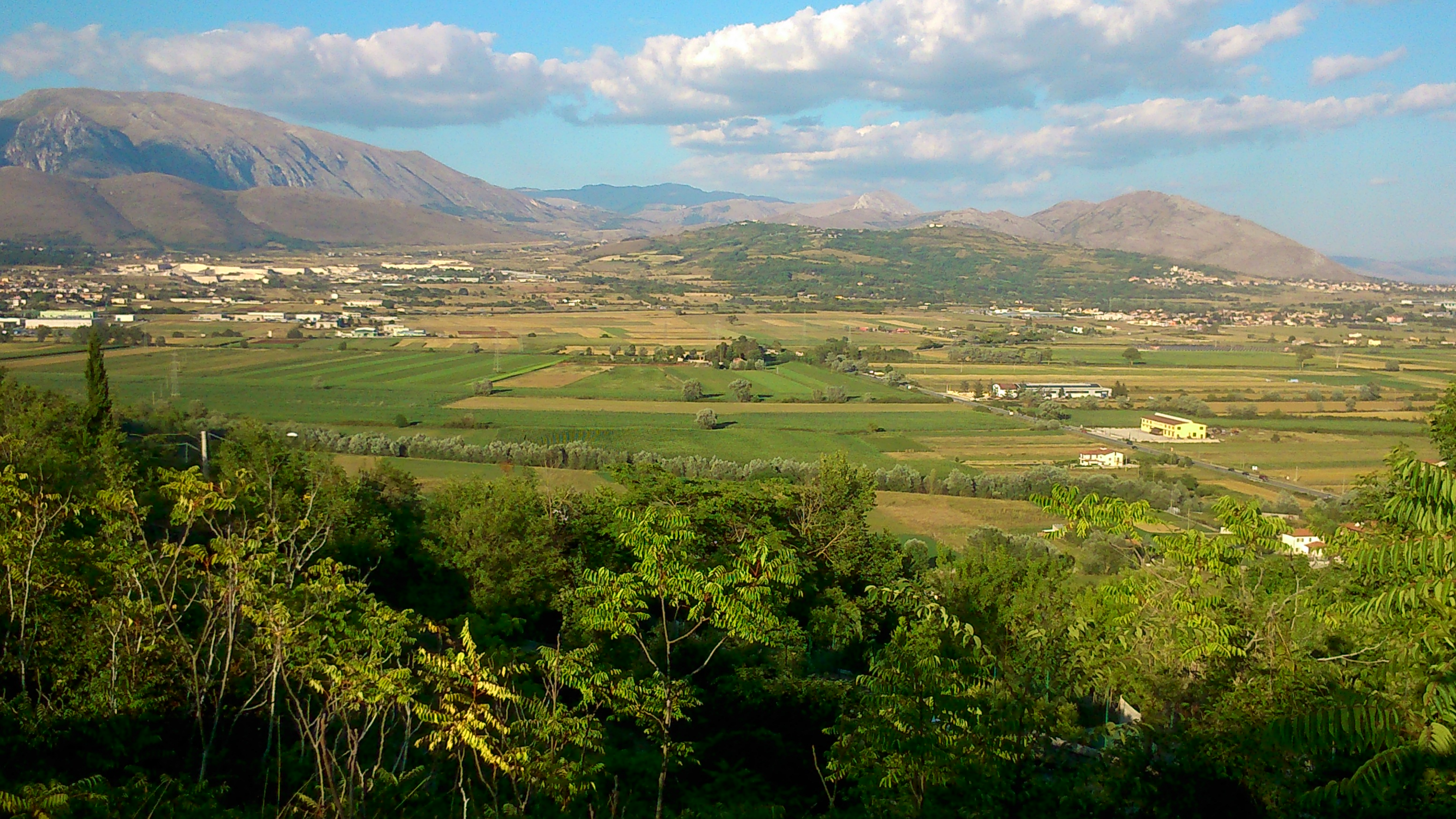 Piani palentini dal Castello Orsini di Scurcola Marsicana. Sulla destra Cappelle, frazione di Scurcola, piu in alto si intravede Antrosano, frazione di Avezzano e sulla sinistra Magliano de' Marsi.